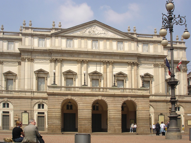 La Scala (théâtre) à Milan